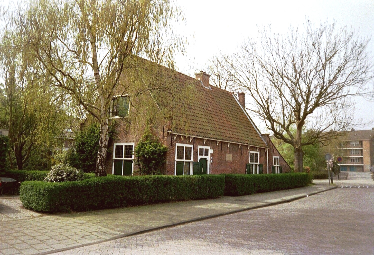 Spinozahaus